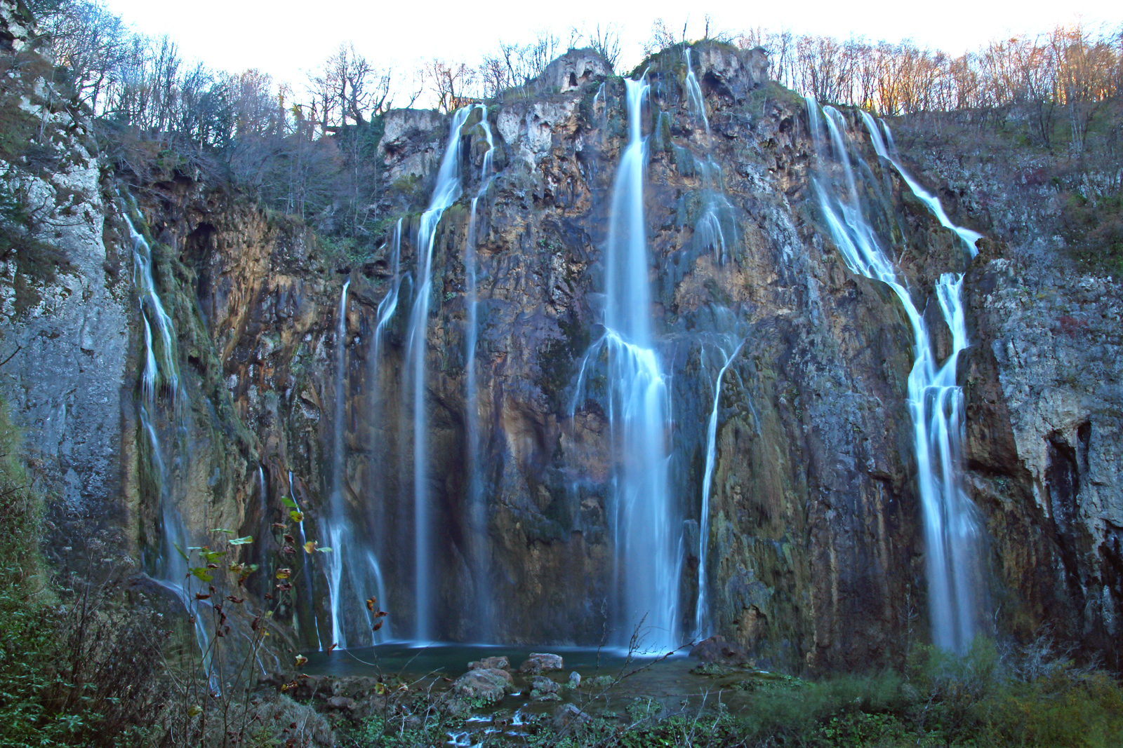 Plitvička jezera, veliki slap u jesen